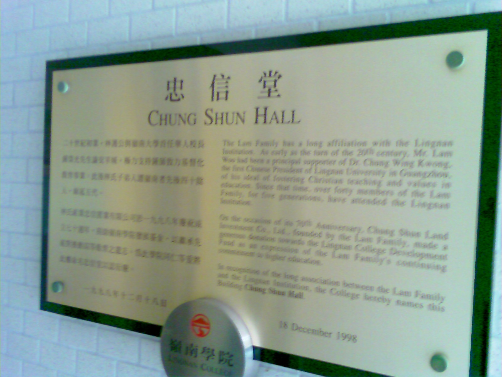 Chung Shun Hall